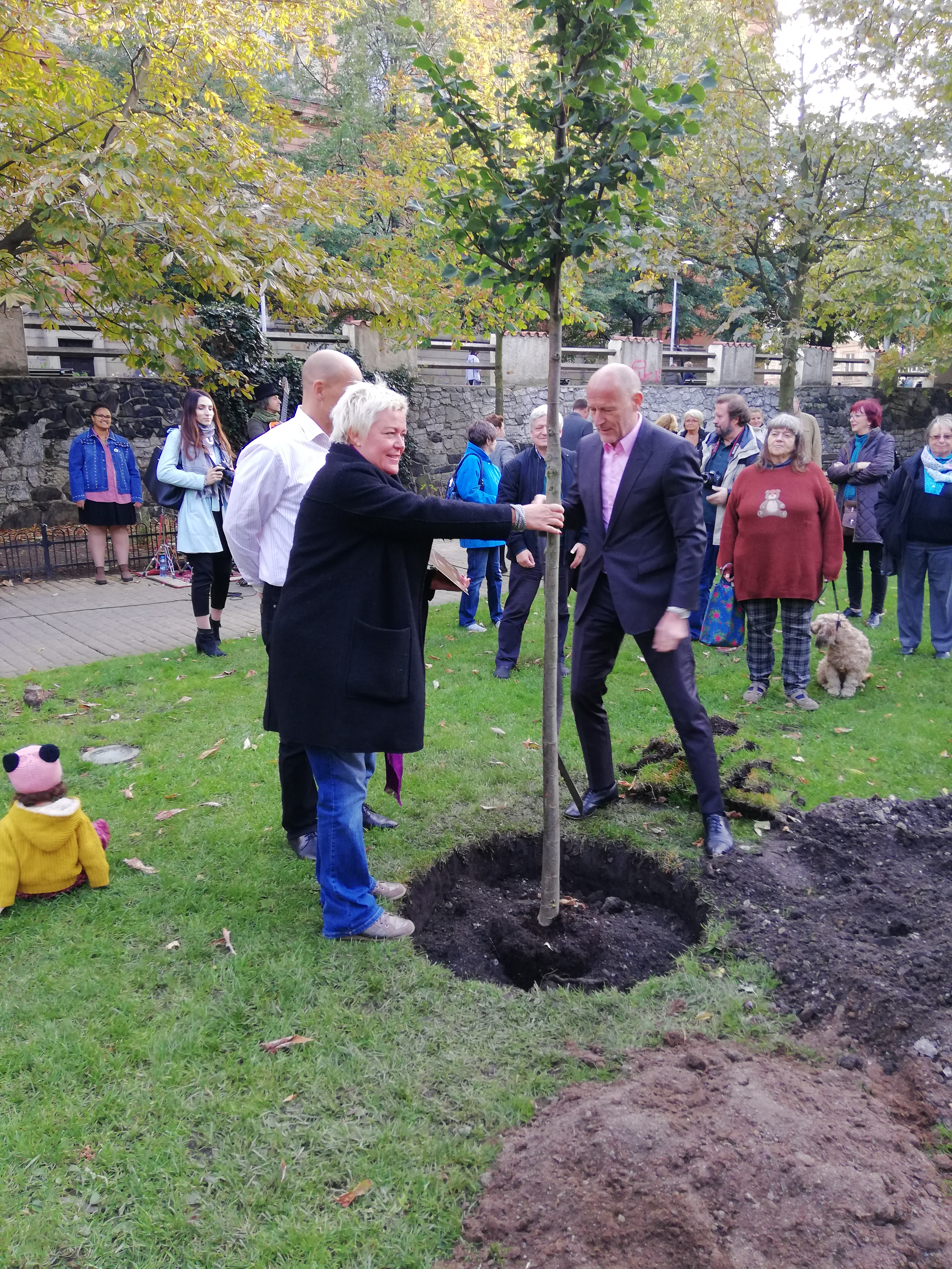 Sázení v pořadí 69. stromu (lípy malolisté) Olgy Havlové v rámci projektu „85 stromů k příležitosti 85 let od narození první dámy Olgy Havlové“. Organizovali: Výbor dobré vůle – Nadace Olgy Havlové + obecně prospěšná společnost Dialog Jessenius + Projekt 35; Místo konání: Praha 5, Park (zahrada) Portheimka, Štefánikova 68/12; Datum a čas konání: 3. října 2018 od 17.00 do 18.00 hodin.